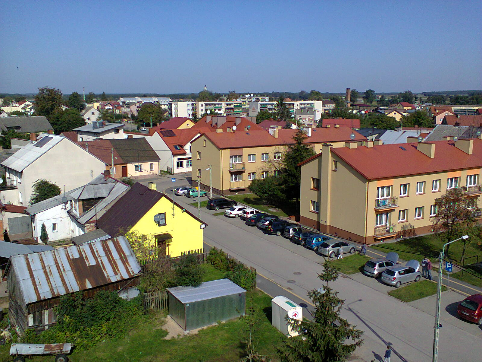 Szczuczyn - widok z wieży strażackiej